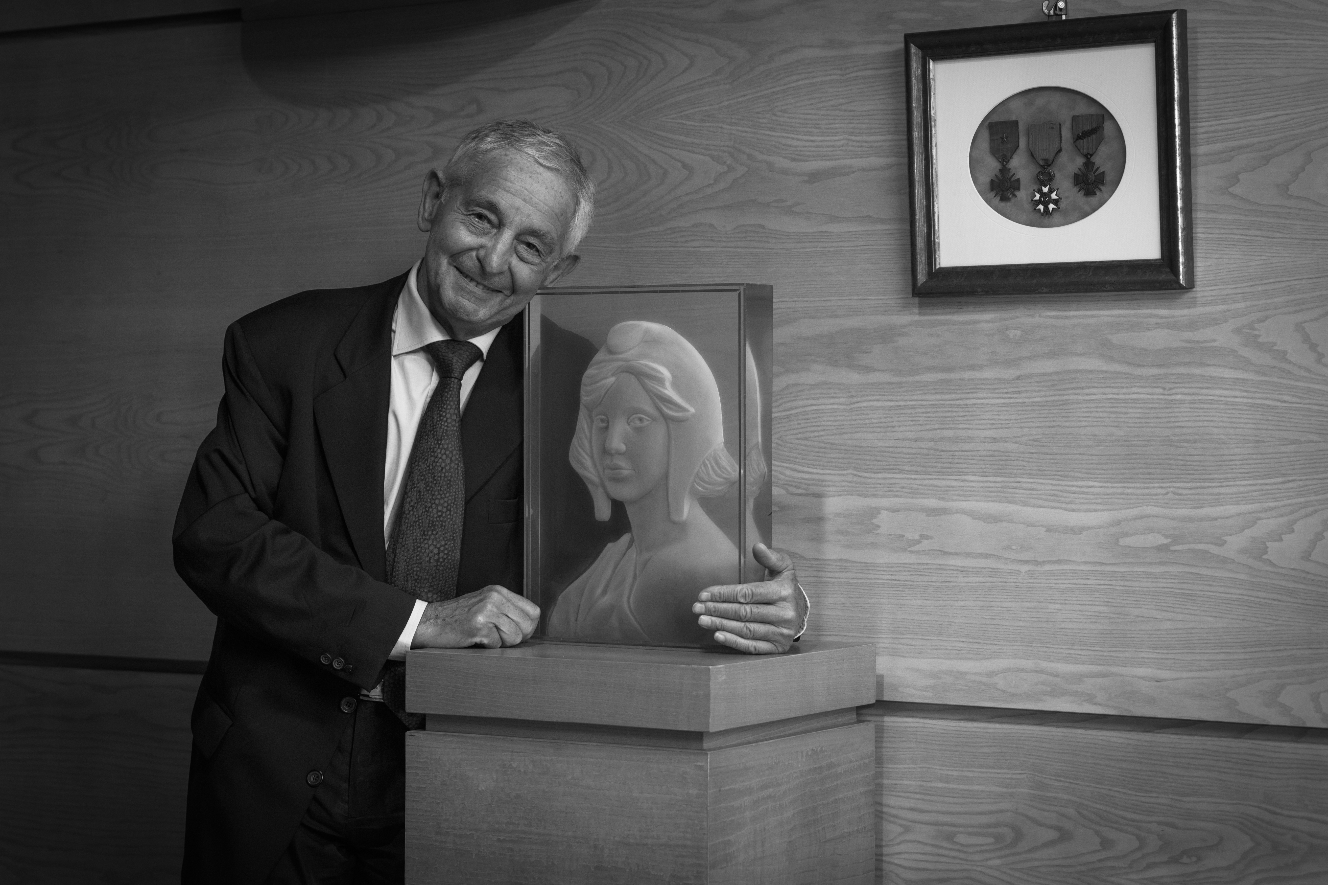 Ivan Levaï, né le 18 mars 1937 à Budapest (Hongrie), est un journaliste de presse écrite, de radio et de télévision.